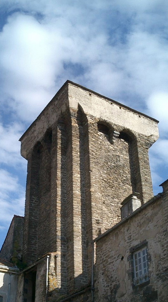 photo de la tour aux vingt angles de Blesle